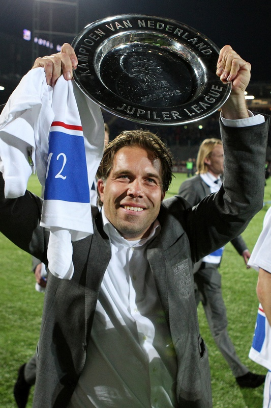 Art Langeler viert kampioenschap FC Zwolle op 13-04-2012